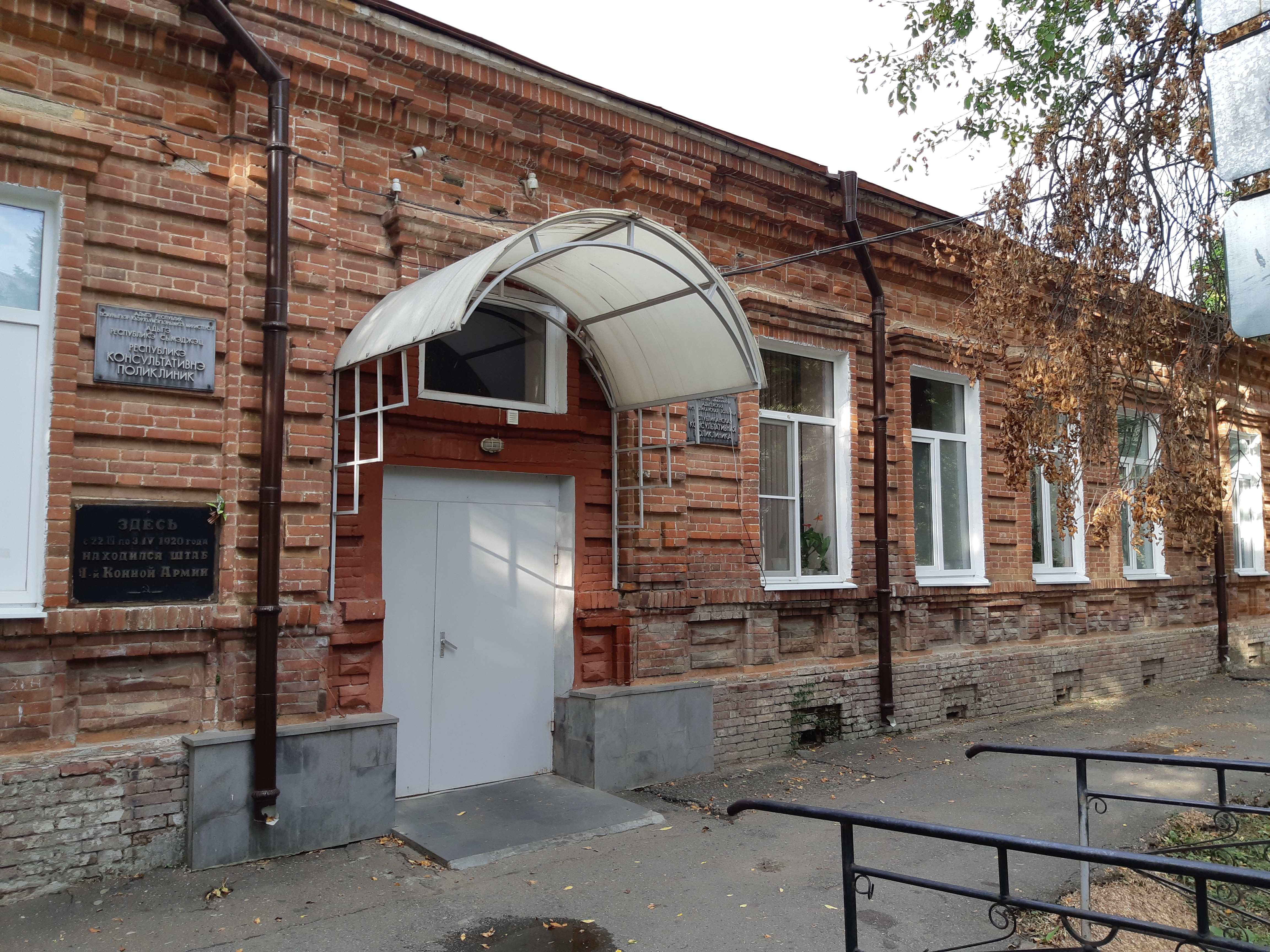 Здание, где располагался штаб 1-й конной армии: улица Комсомольская, 212, Майкоп, Адыгея